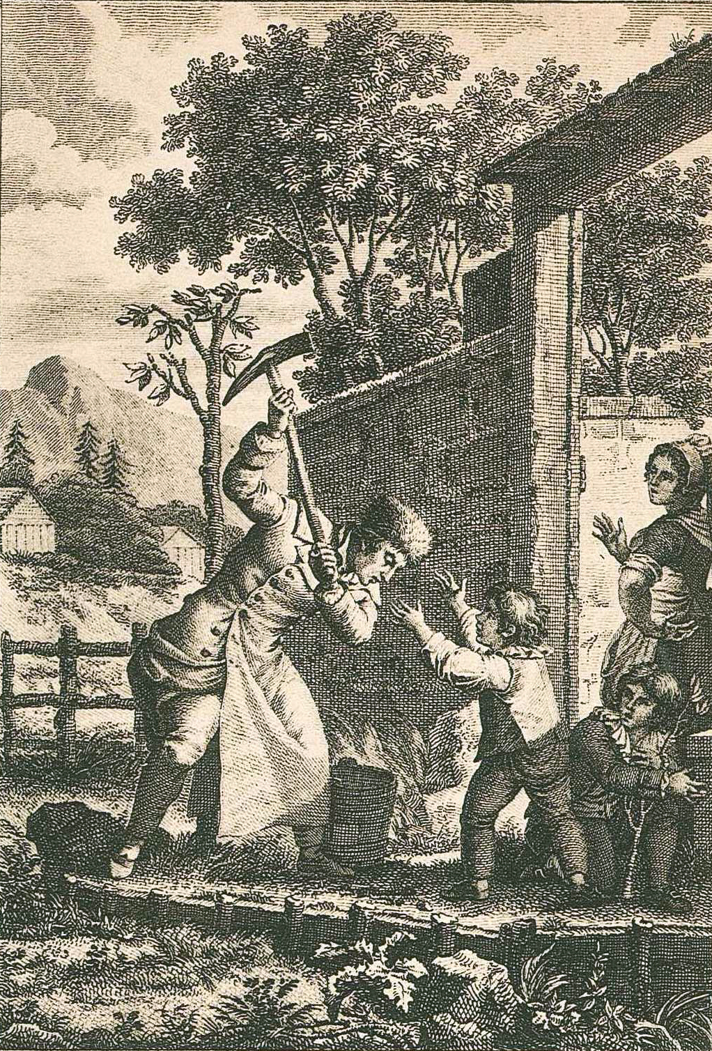 Carte postale. Bibliothèque de Genève. Numéro d'inventaire : 2014-028 CP 02.